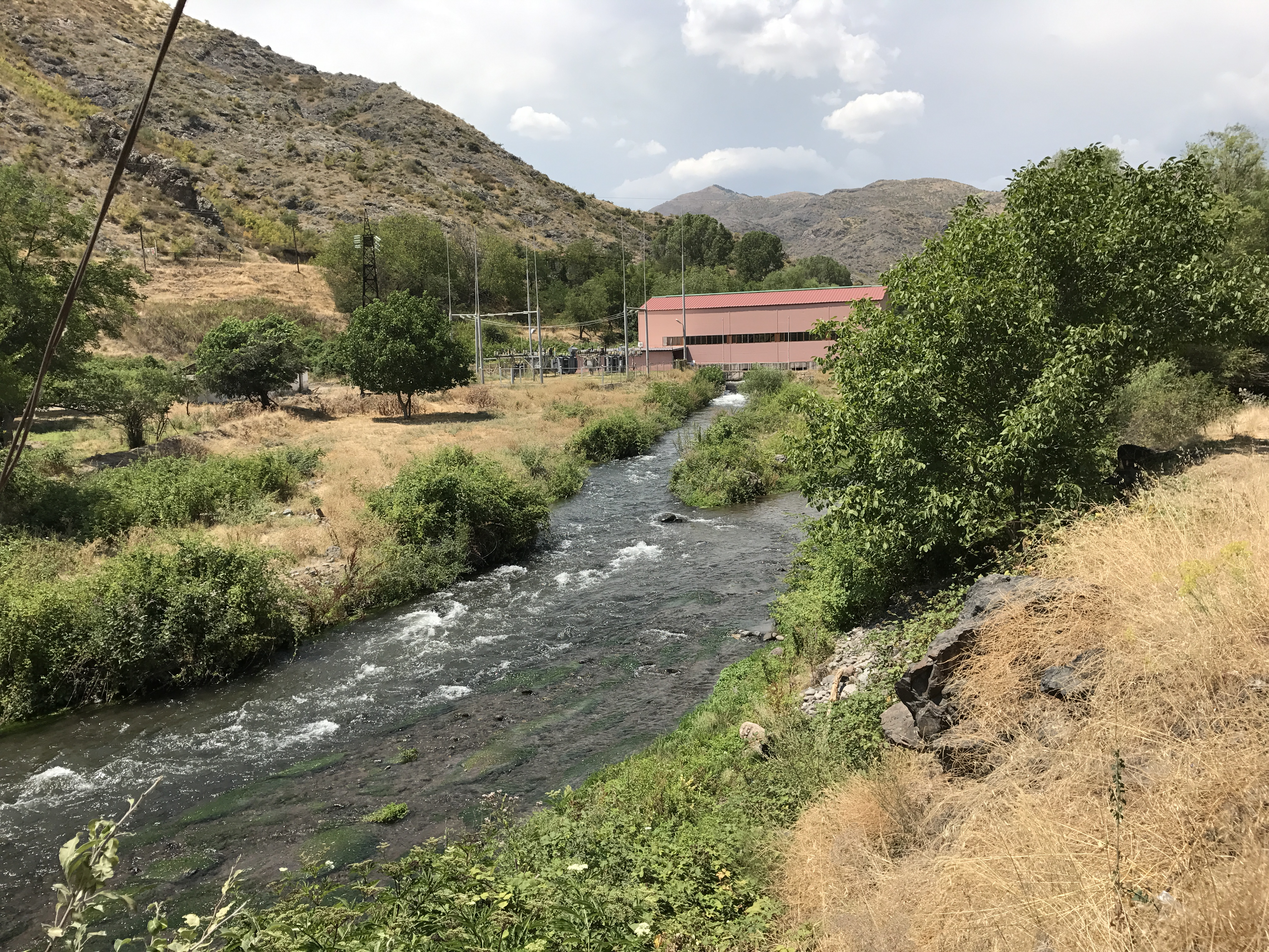 Rivière Aghavno près du poste-frontière à l'entrée du corridor de Lachin.